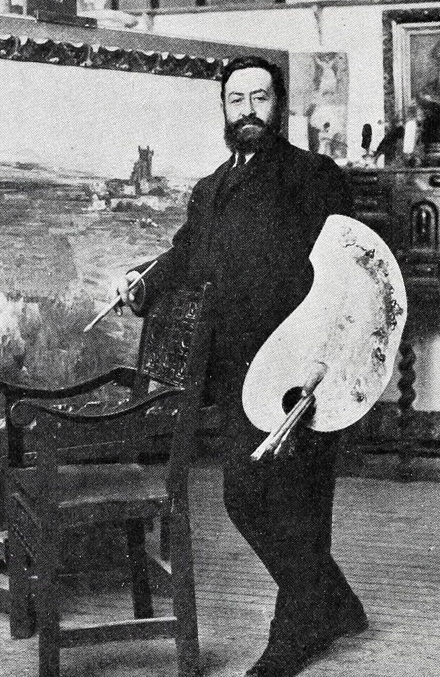 Marceliano Santamaría.